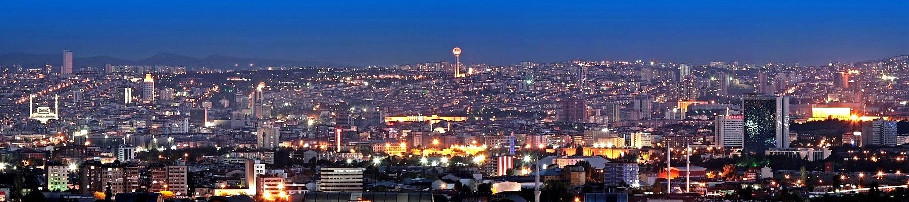 Ankara panoroması, (Kızılay, Cebeci, Kolej, Ankara).